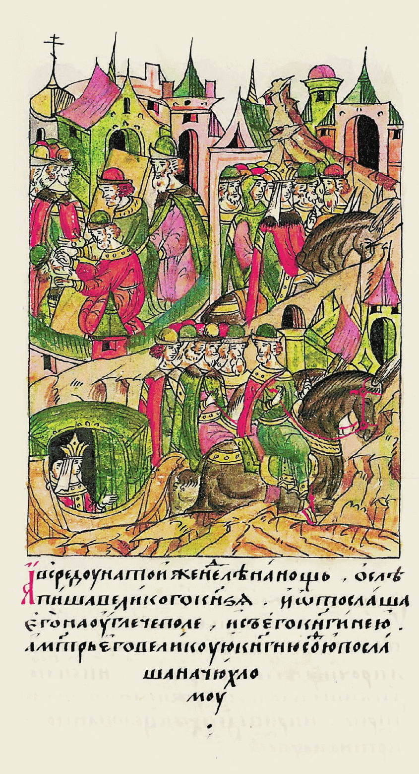 Ослепление Василия II Васильевича. Миниатюра из летописного свода XVI века "В среду на той же неделе в ночь ослепили вели- кого князя и отослали его на Углеч-поле с его княгинею; а мать его великую княги- ню Софью послали на Чухлому"